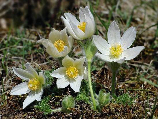 Pulsatilla vulgaris var. alba. Photographer: Mg-k.